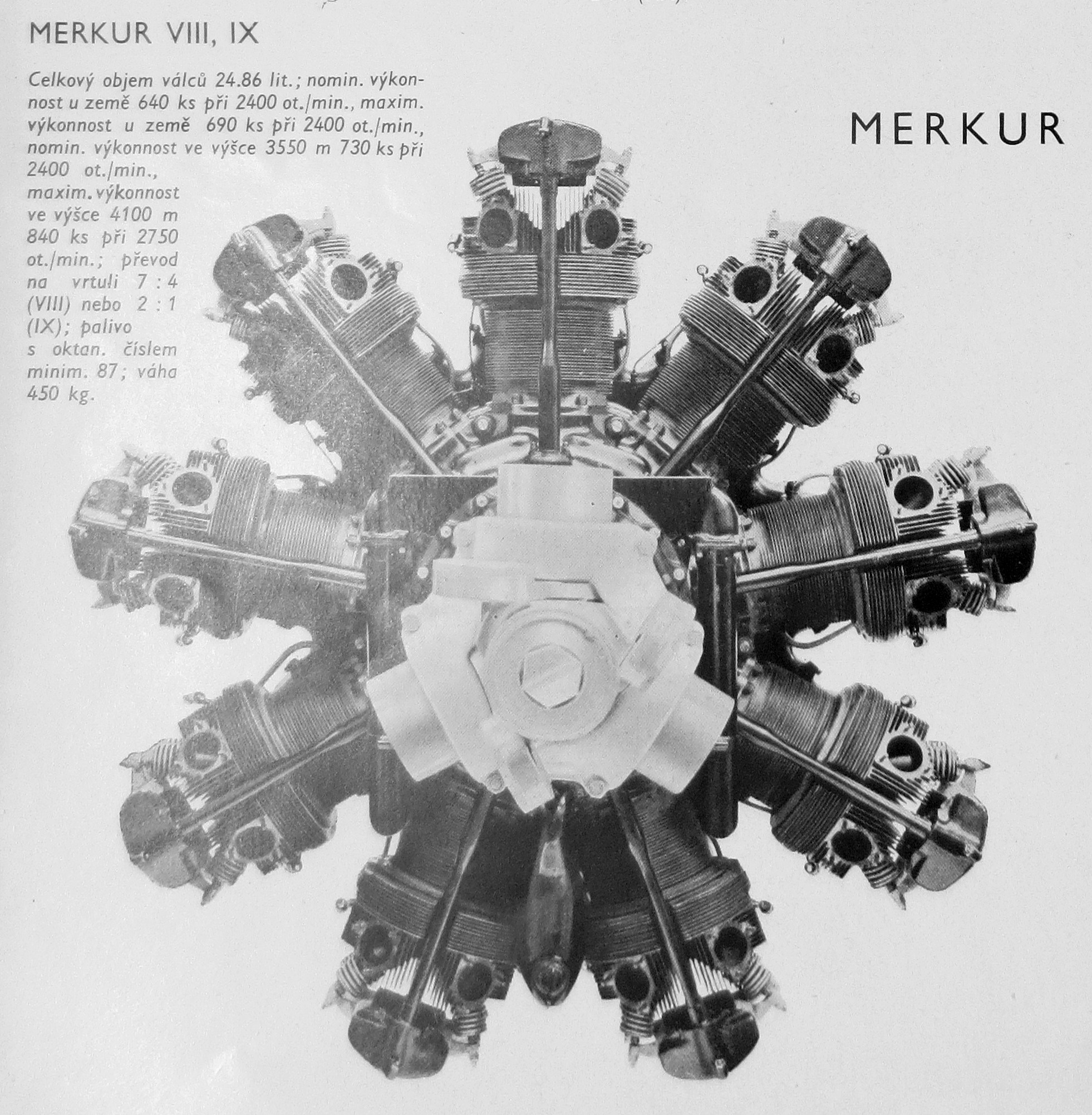 Walter Merkur VIII, IX (licence Bristol Mercury)